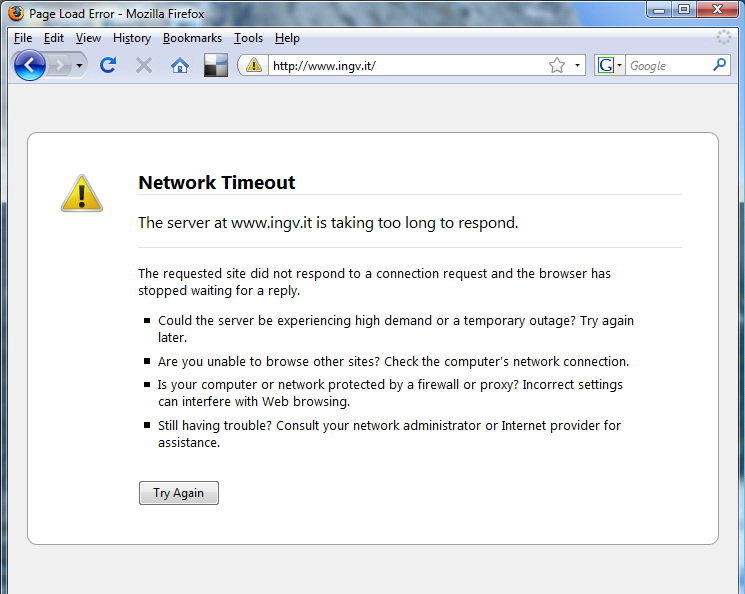 Sisma 4° grado fra Romagna e Marche